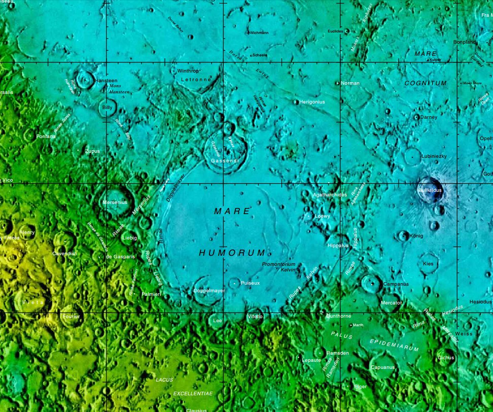 Cráter lunar Gassendi. Localización. (Cartografía LRO)